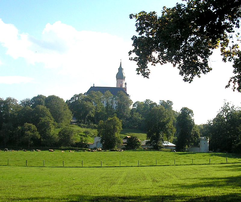 Kloster Andechs (Landkreis Starnberg, Oberbayern). Ansicht von Norden. Eigene Aufnahme, Sept. 2006 / Andechs Monastery (Upper Bavaria, Germany). View from the north. Own photo, Sept 2006